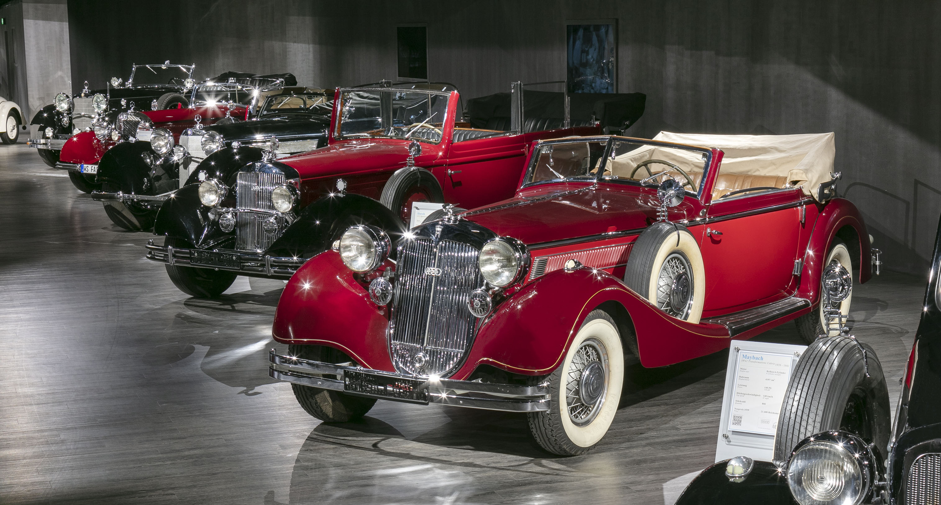 Bild zeigt Fahrzeuge der Ausstellung